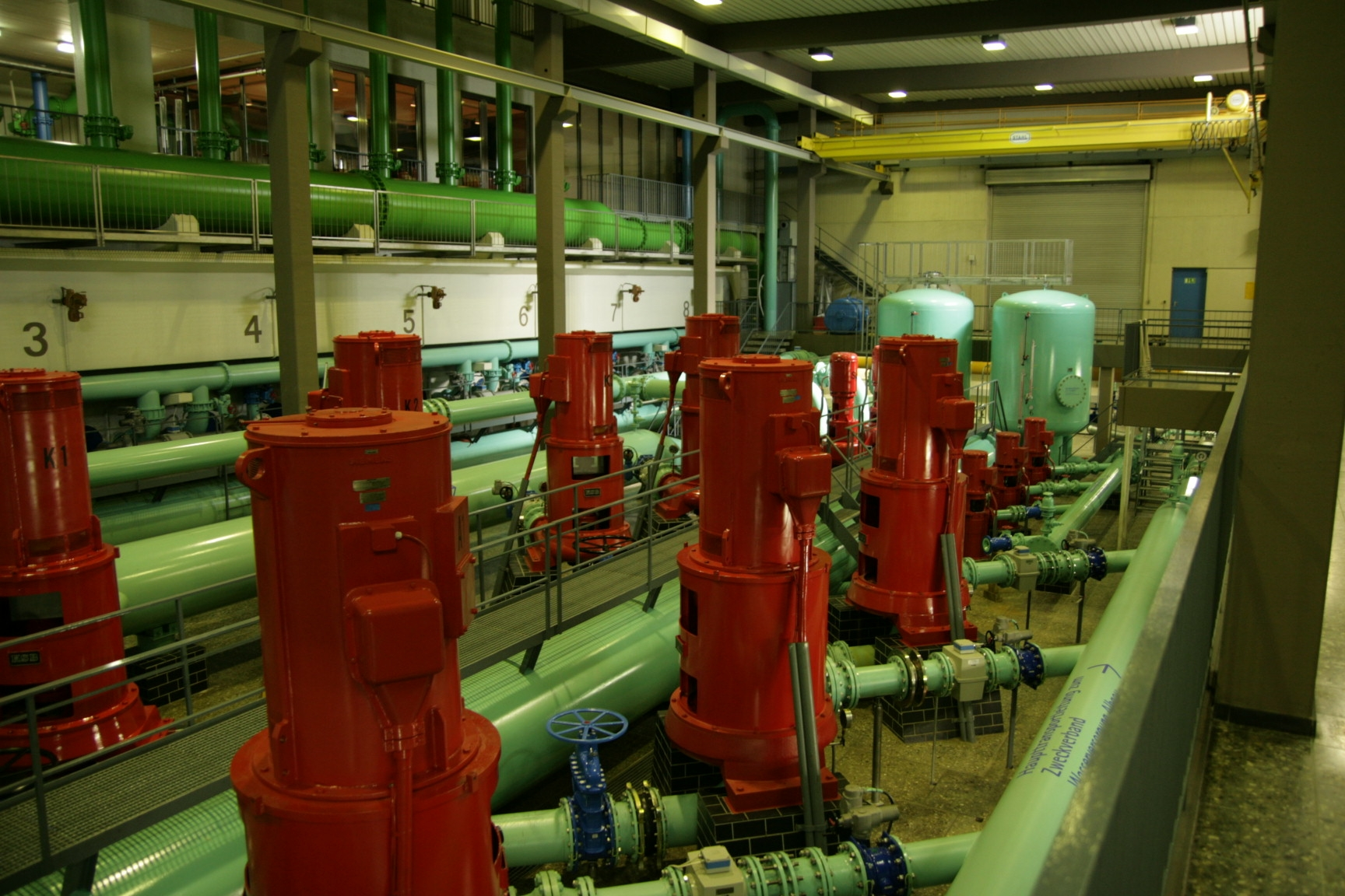 Das Innere des Wasserwerkes Elchesheim-Illingen, am Tag der offenen Tür. Ein Wasserwerk der Stadtwerke Karlsruhe.